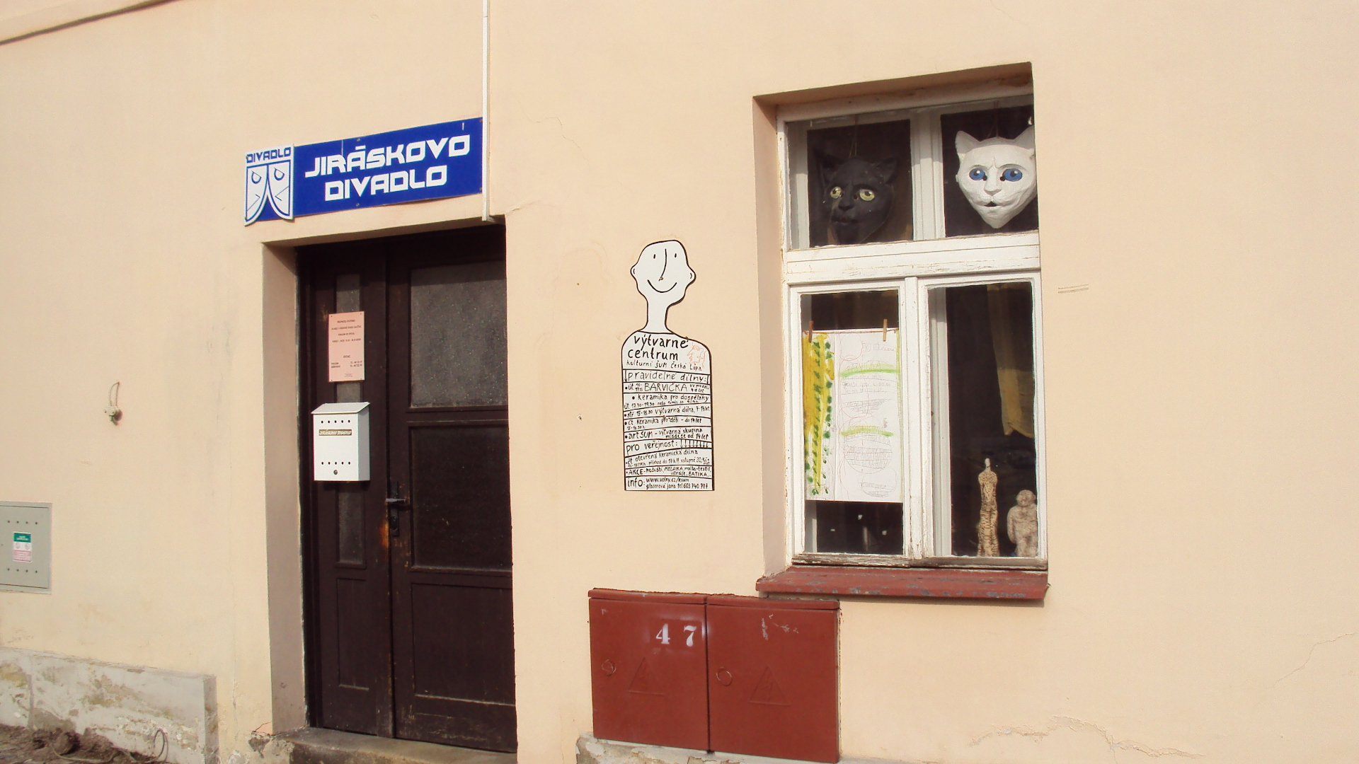 Česky: Vchod do divadla v Panské ulici